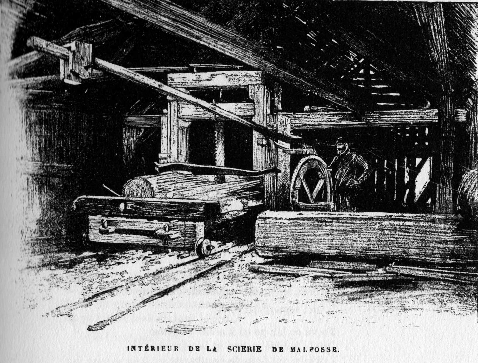 Haut-fer de la scierie de Malfosse, à Moyenmoutier (Vosges), à la fin du XIXe siècle